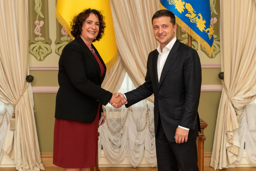 Президент України Володимир Зеленський прийняв вірчі грамоти у послів низки іноземних держав: Сполученого Королівства Великої Британії та Північної Ірландії – Мелінди Сіммонс.